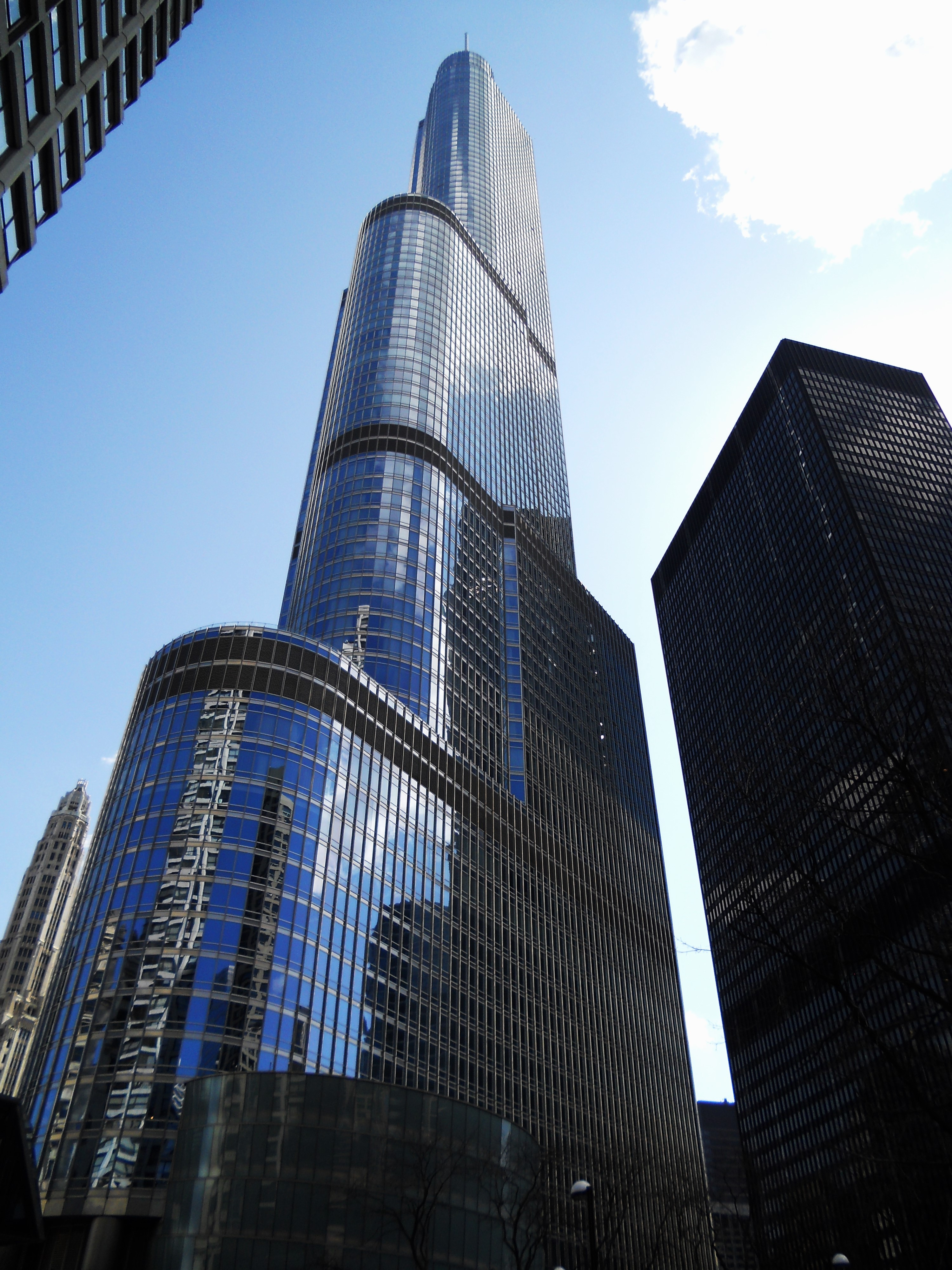 Trump Hotel & Tower Chicago April 2015